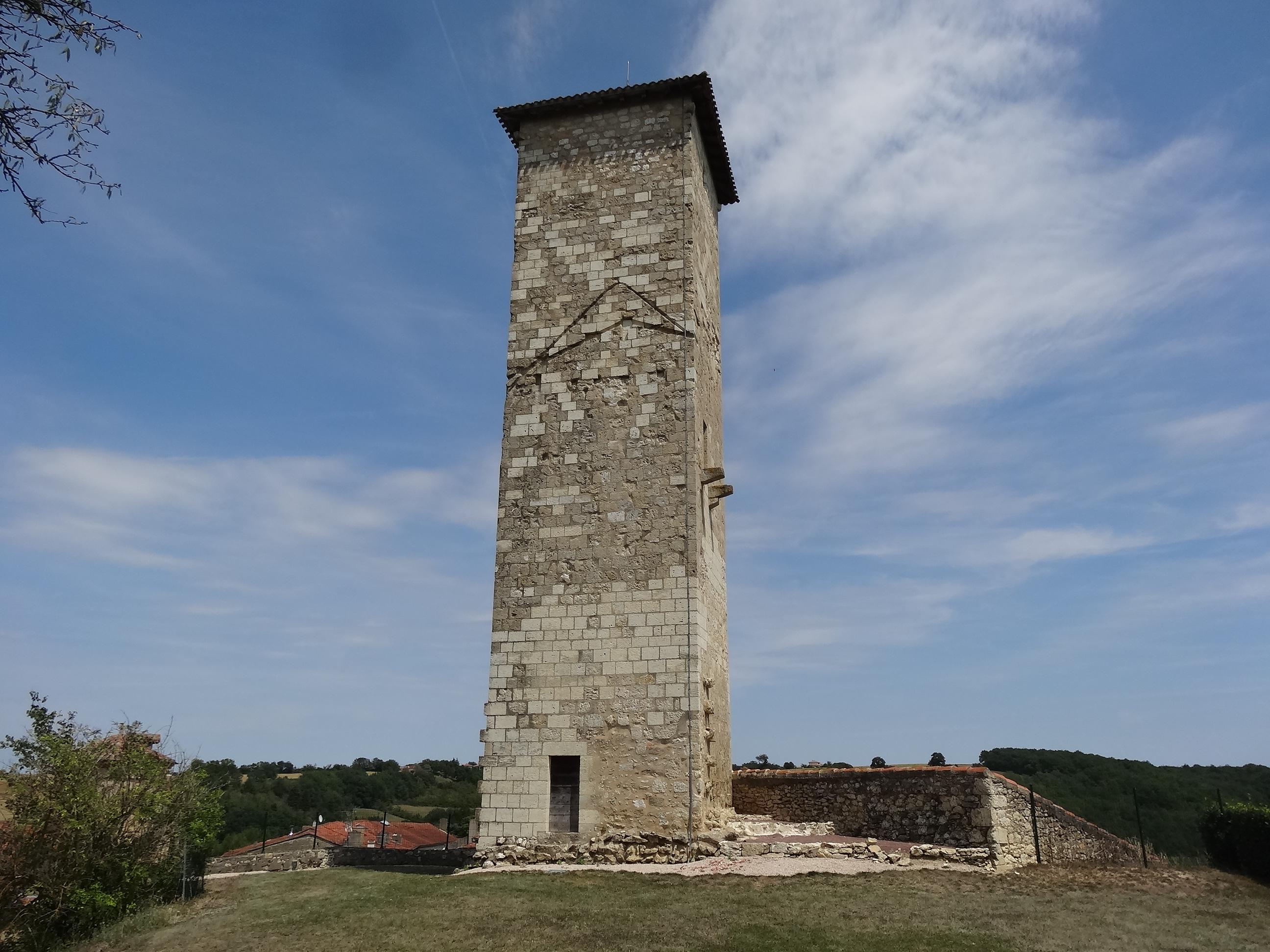 Tour carrée de Biran.